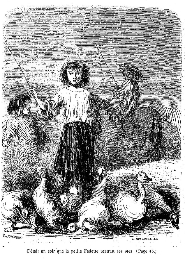 George Sand illustrée par Tony Johannot et Maurice Sand. La Petite Fadette, de George Sand, Paris, Michel-Lévy frères, 1851 (réédition illustrée du roman initialement paru en 1849).